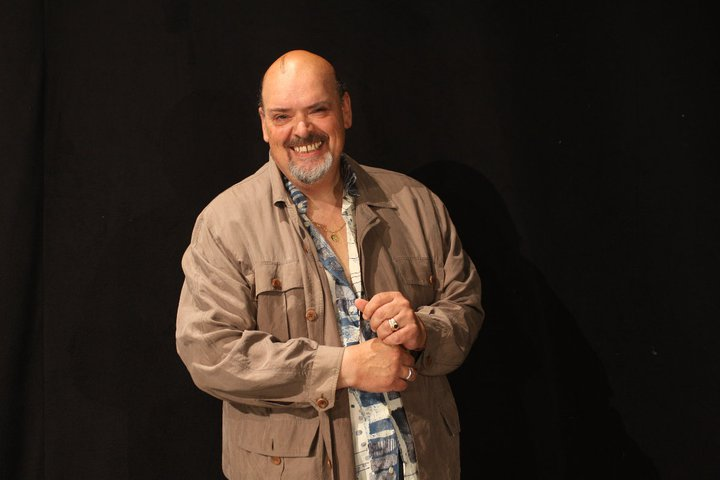 Vincenzo Failla